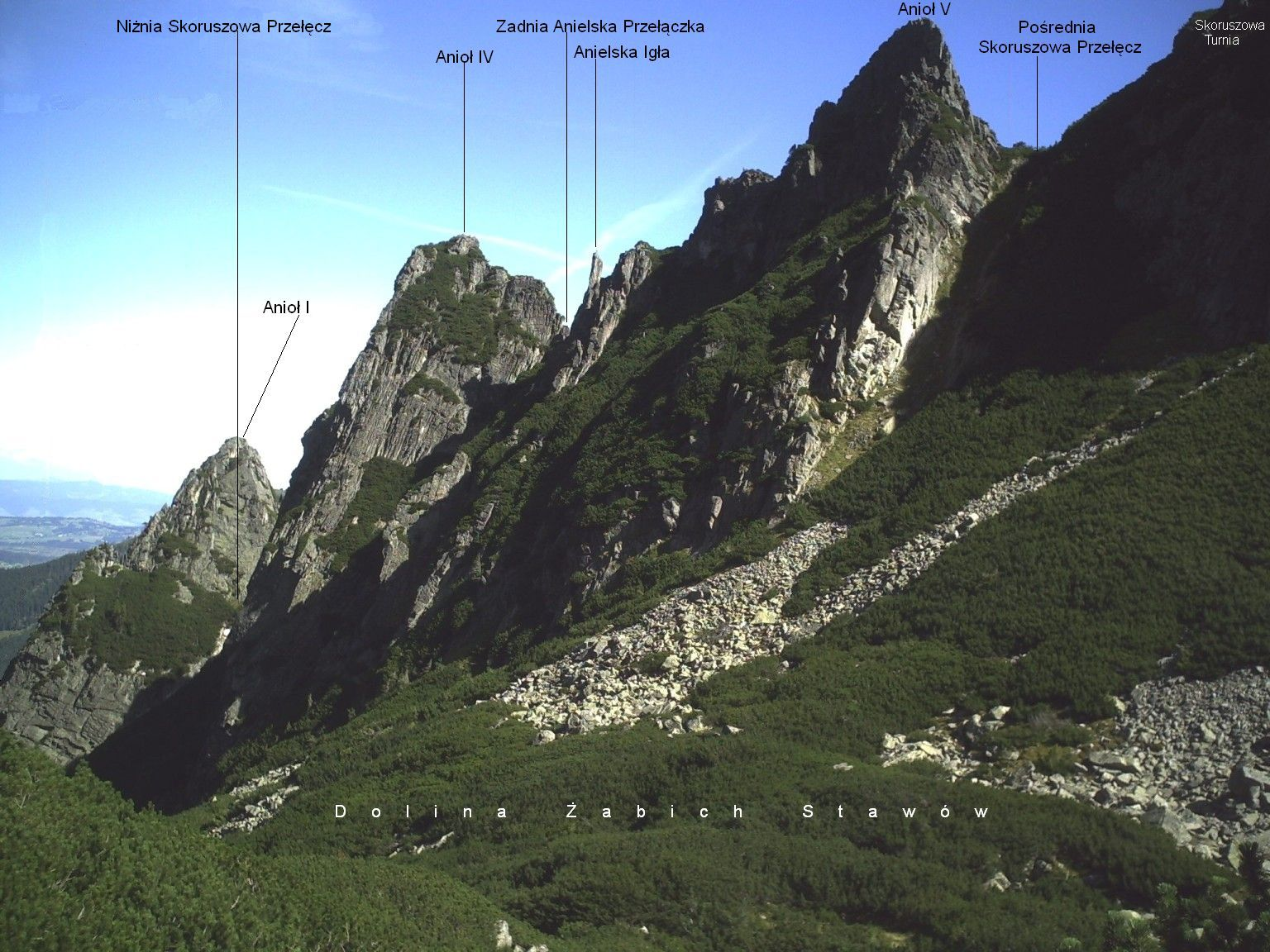 Anioły w grani Skorusniaka. Widok z Doliny Żabich Stawów Białczańskich